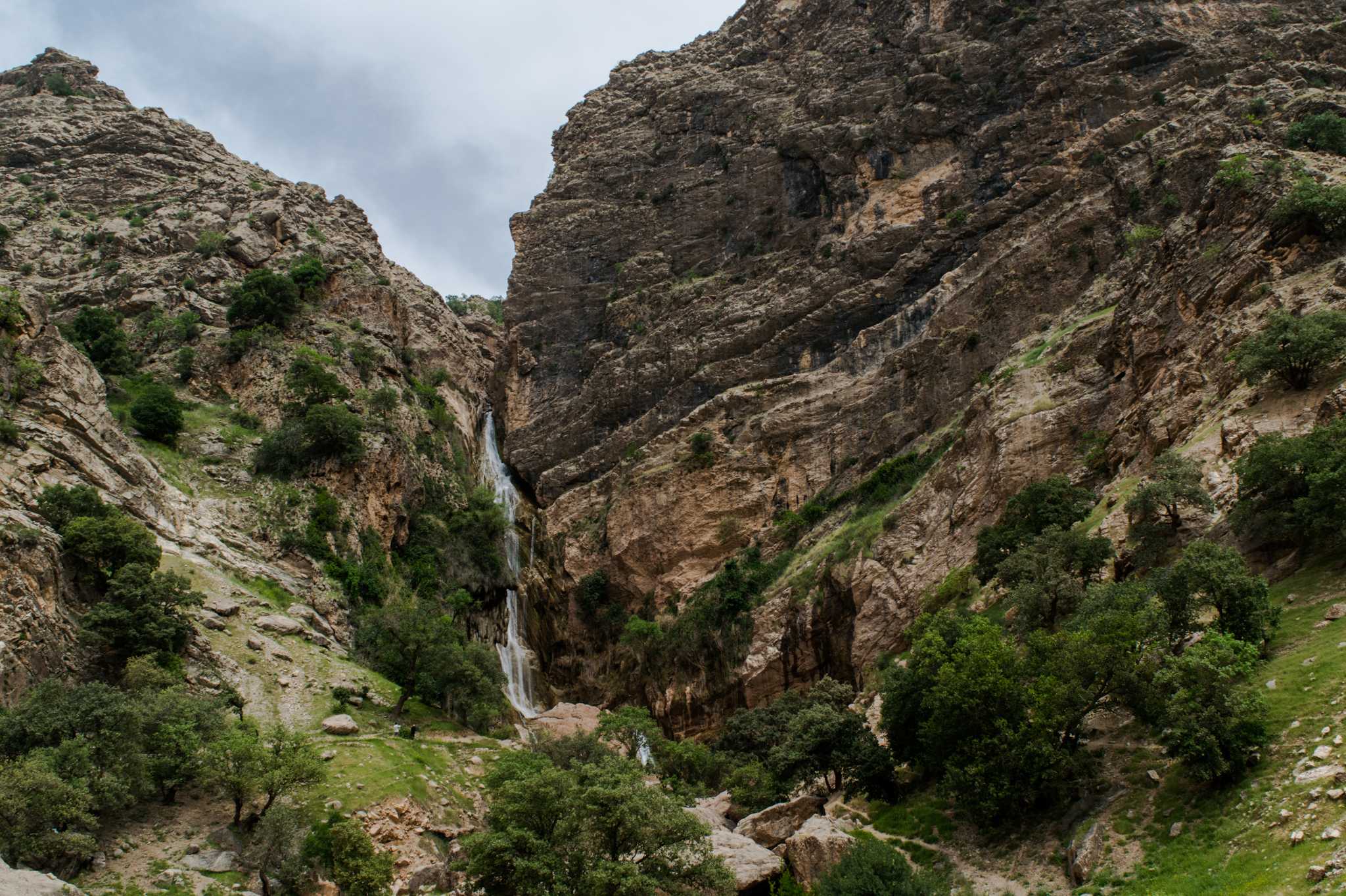 آبشار نوژیان